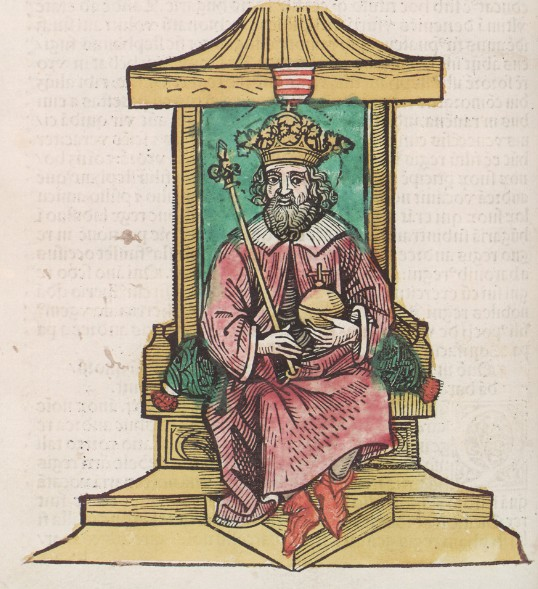 Václav III.